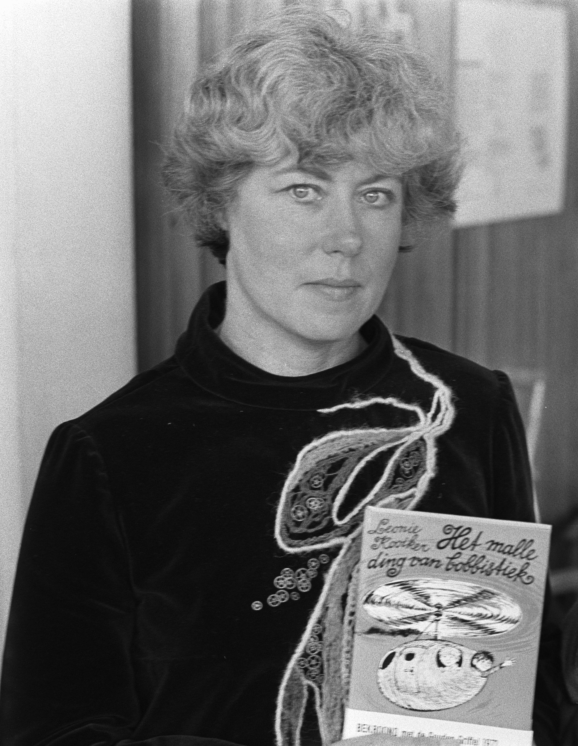 Collectie / Archief : Fotocollectie Anefo Reportage / Serie : [ onbekend ] Beschrijving : Prijs voor Kinderboek 1971 bekend gemaakt, Amsterdam, (l) Kooiker, (r) Schouten Datum : 5 oktober 1971 Locatie : Amsterdam, Noord-Holland Trefwoorden : prijzen Fotograaf : Evers, Joost / Anefo Auteursrechthebbende : Nationaal Archief Materiaalsoort : Negatief (zwart/wit) Nummer archiefinventaris : bekijk toegang 2.24.01.05 Bestanddeelnummer : 925-0095